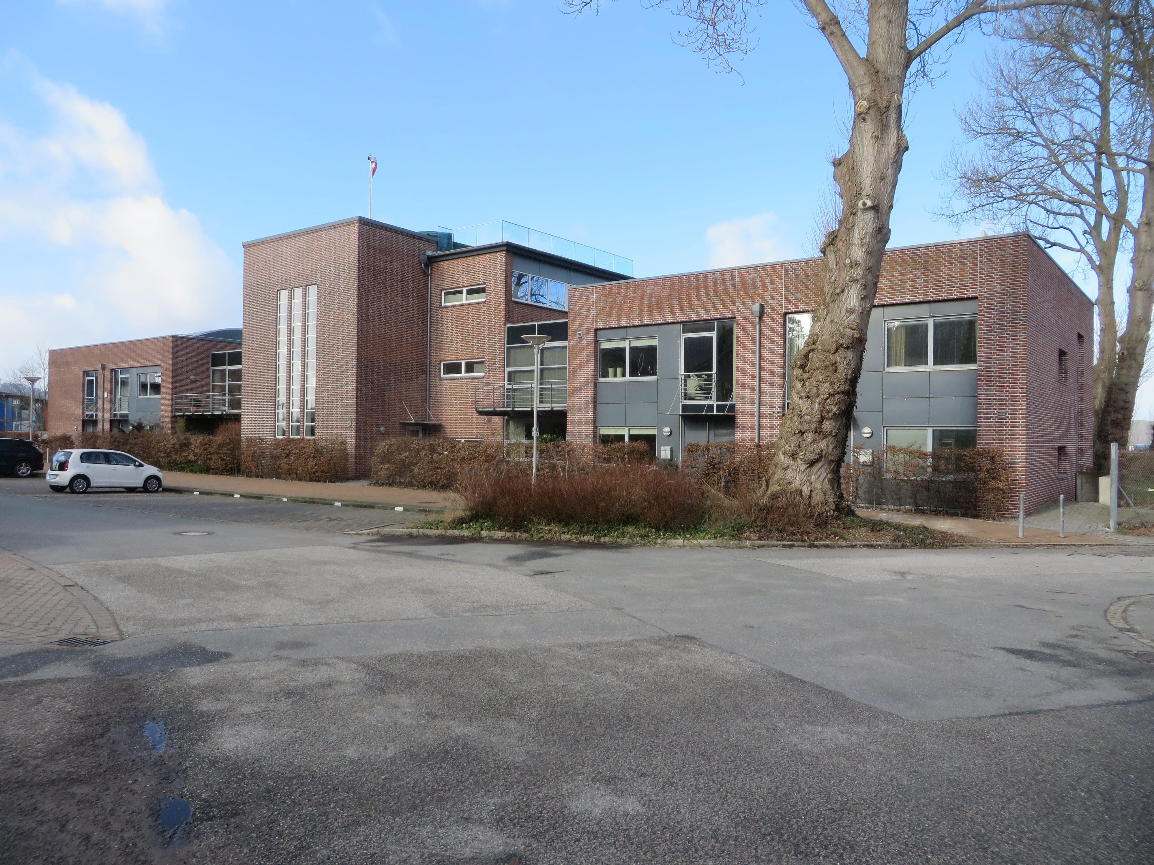 Kapitänshaus Sonwik (Flensburg-Mürwik 22 Februar 2017), Bild 05